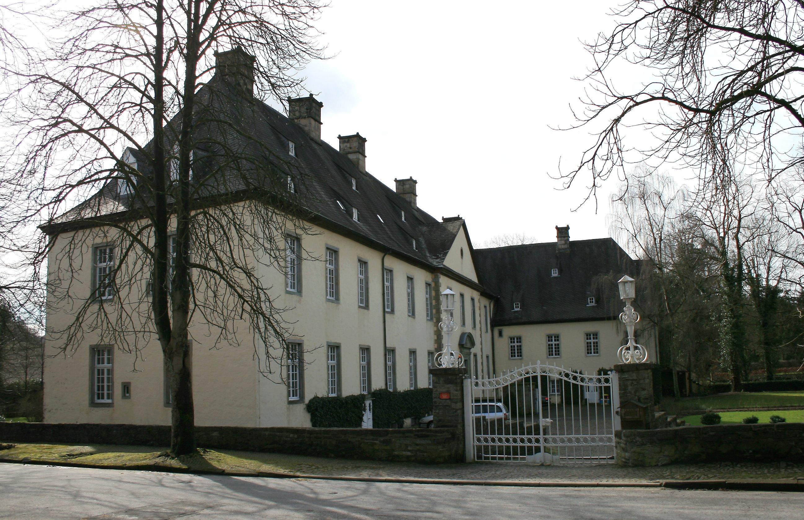 Schloss Wocklum (Privatbesitz) in Balve-Wocklum This image shows a heritage building in Germany, located in the North Rhine-Westphalian city Balve (no. 6).